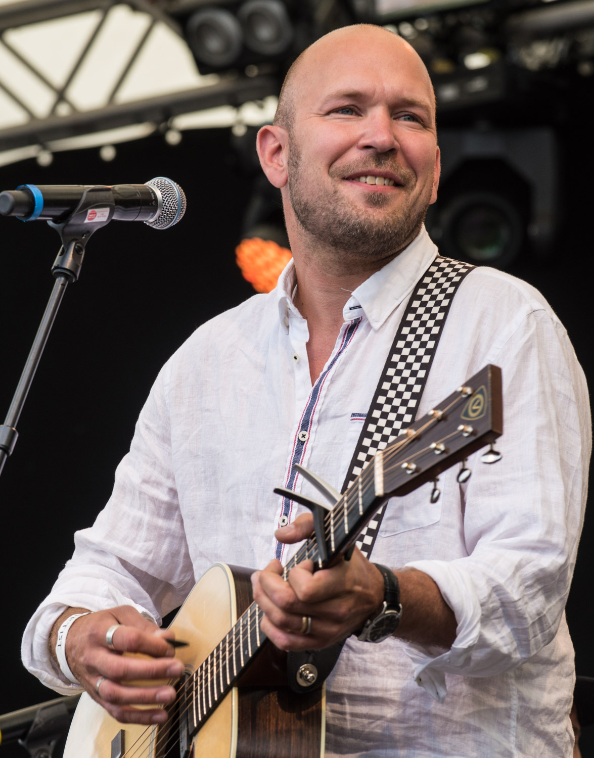 Johan Östling och Björn Starrin på den värmländska musikfestivalen Putte i Parken i Kungsträdgården i Stockholm den 25 juli 2015.